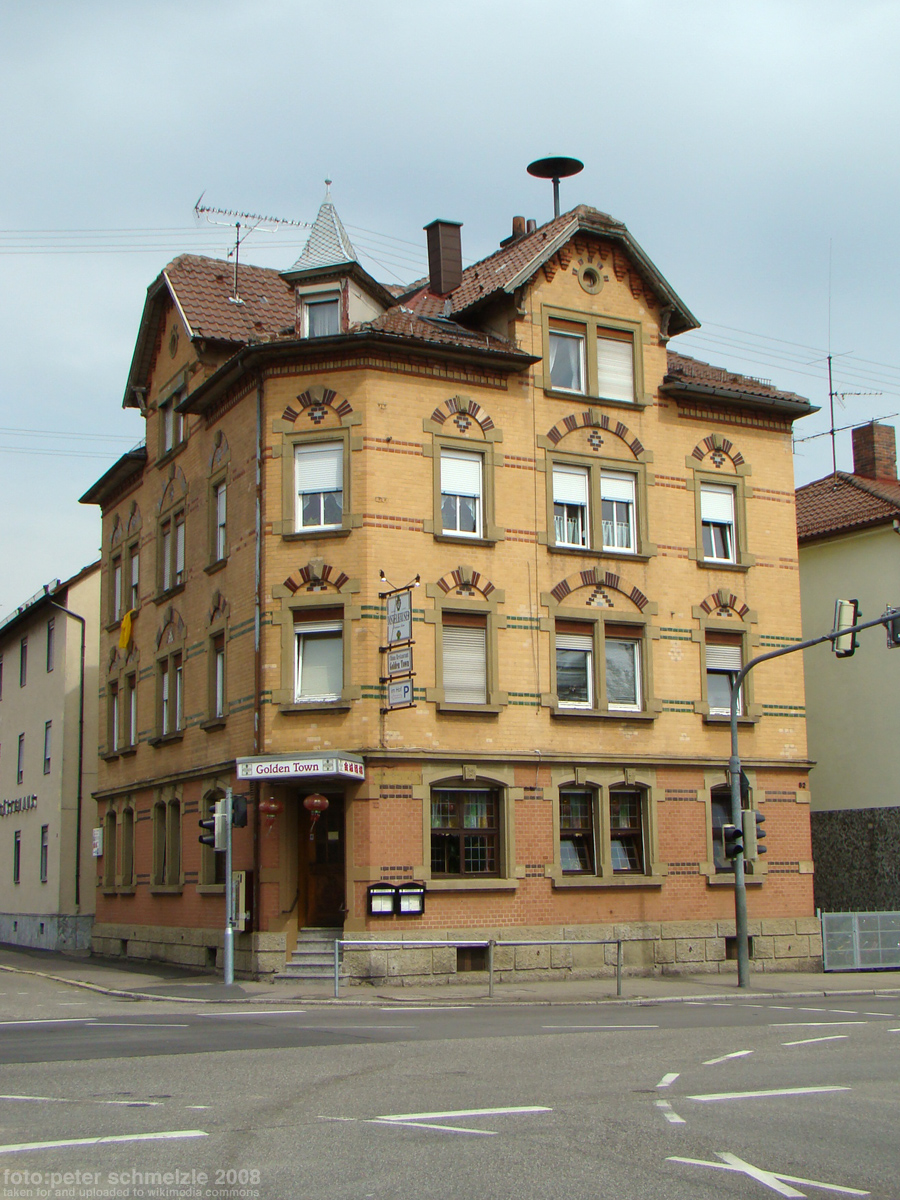 Denkmalgeschütztes Gebäude Großgartacher Str. 82 in Heilbronn-Böckingen